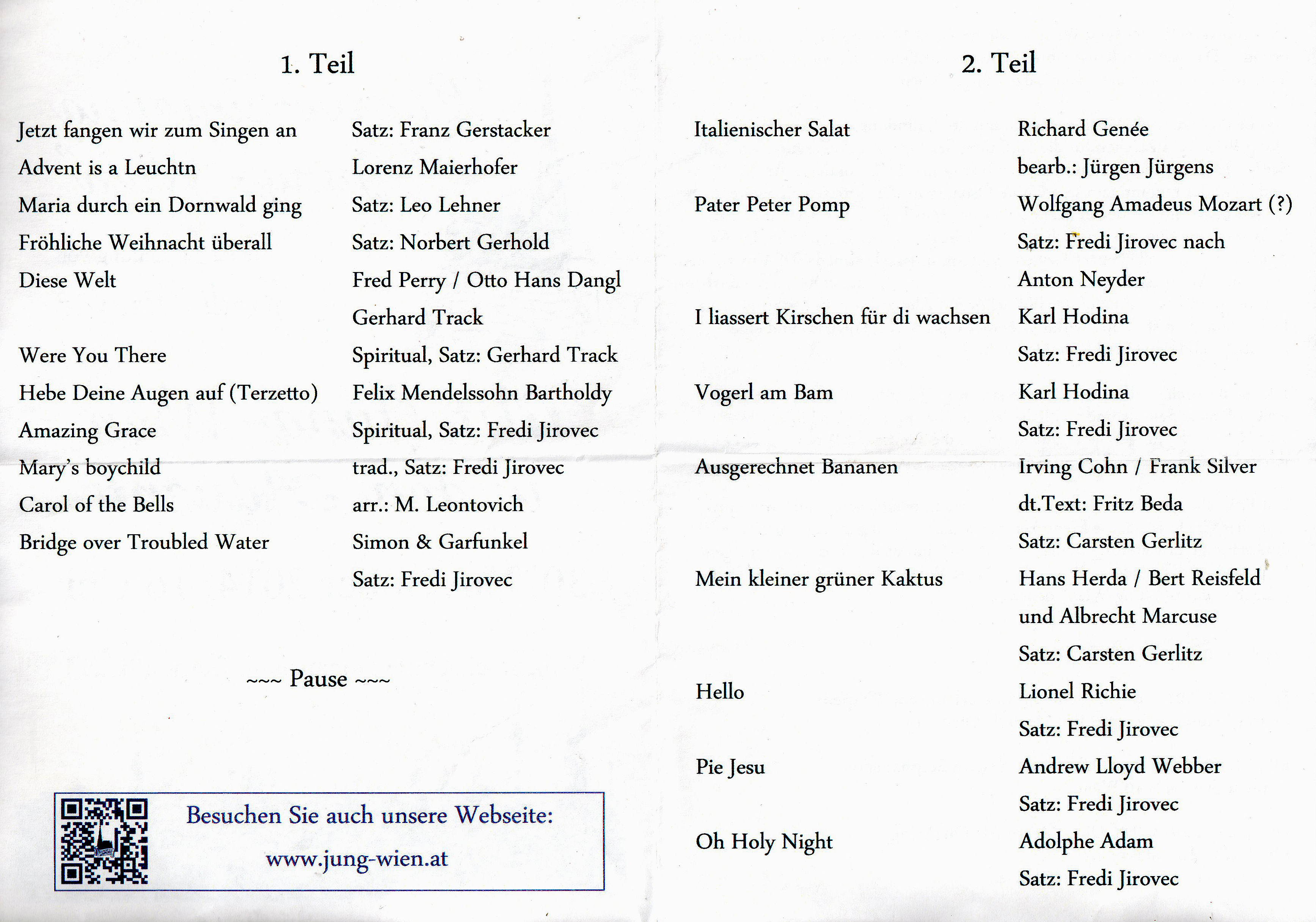 Programm des Konzerts der Chorvereinigung Jung-Wien am 30. November 2014 in der Volkshochschule Donaustadt, Bernoullistraße 1 im 22. Wiener Gemeindebezirk